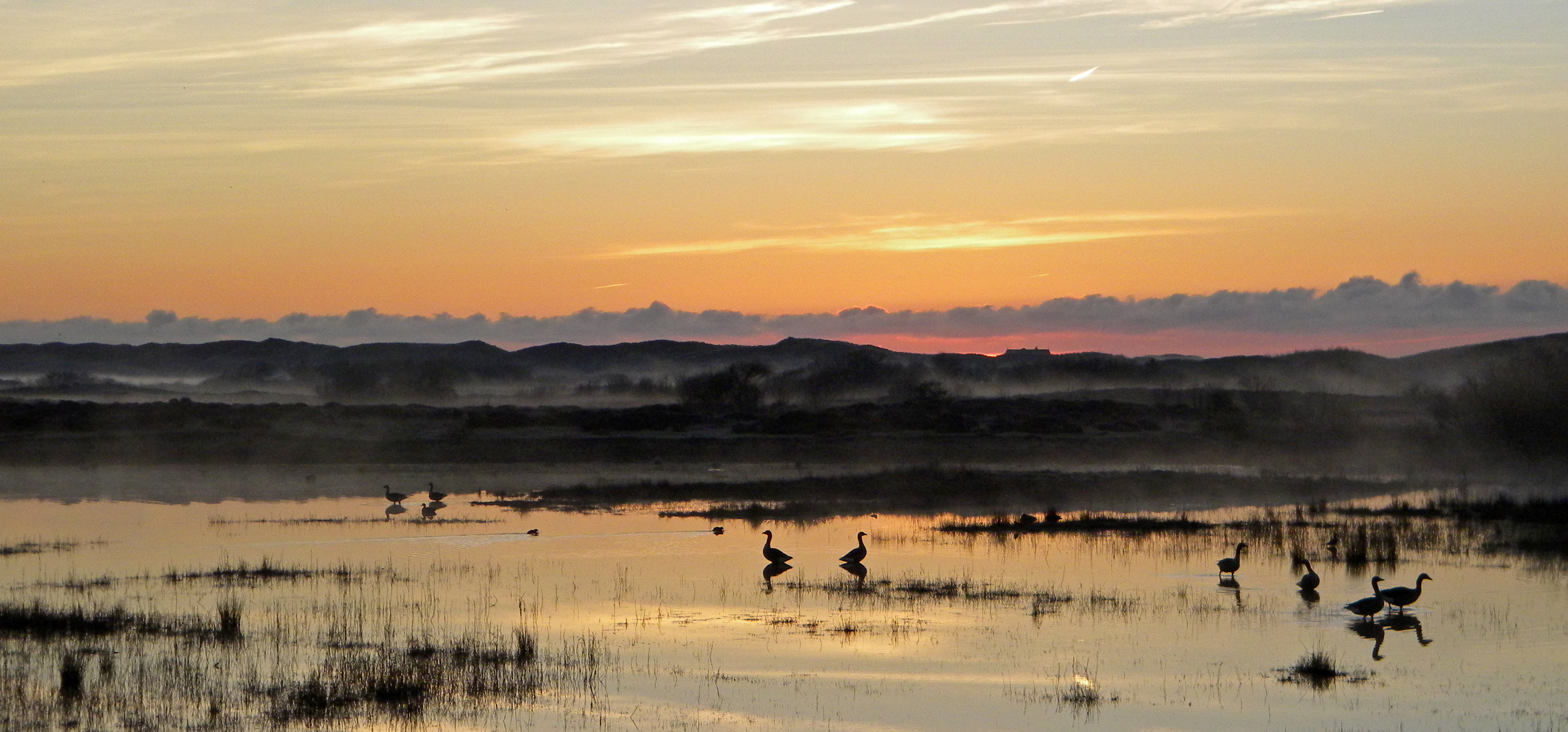 Natuurgebied "De Nederlanden" vlak voor zonsopkomst This is a photo or sound file made in Dunes of Texel National Park in the Netherlands, with the main subject of the file in the category: panorama photo